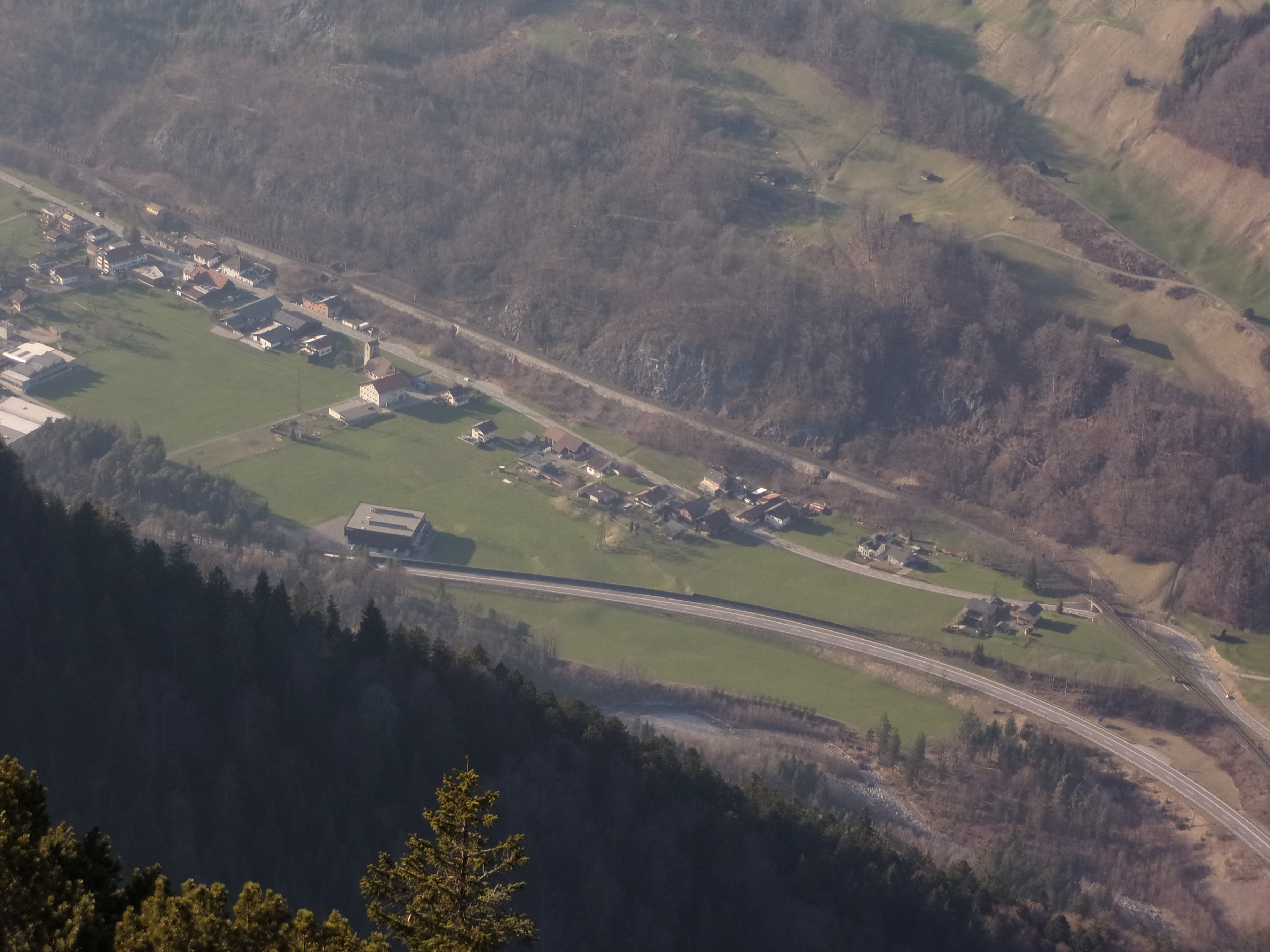 Blick vom Davennakopf (1708 m) auf (Ober-)Bings mit Kirche und Schule.